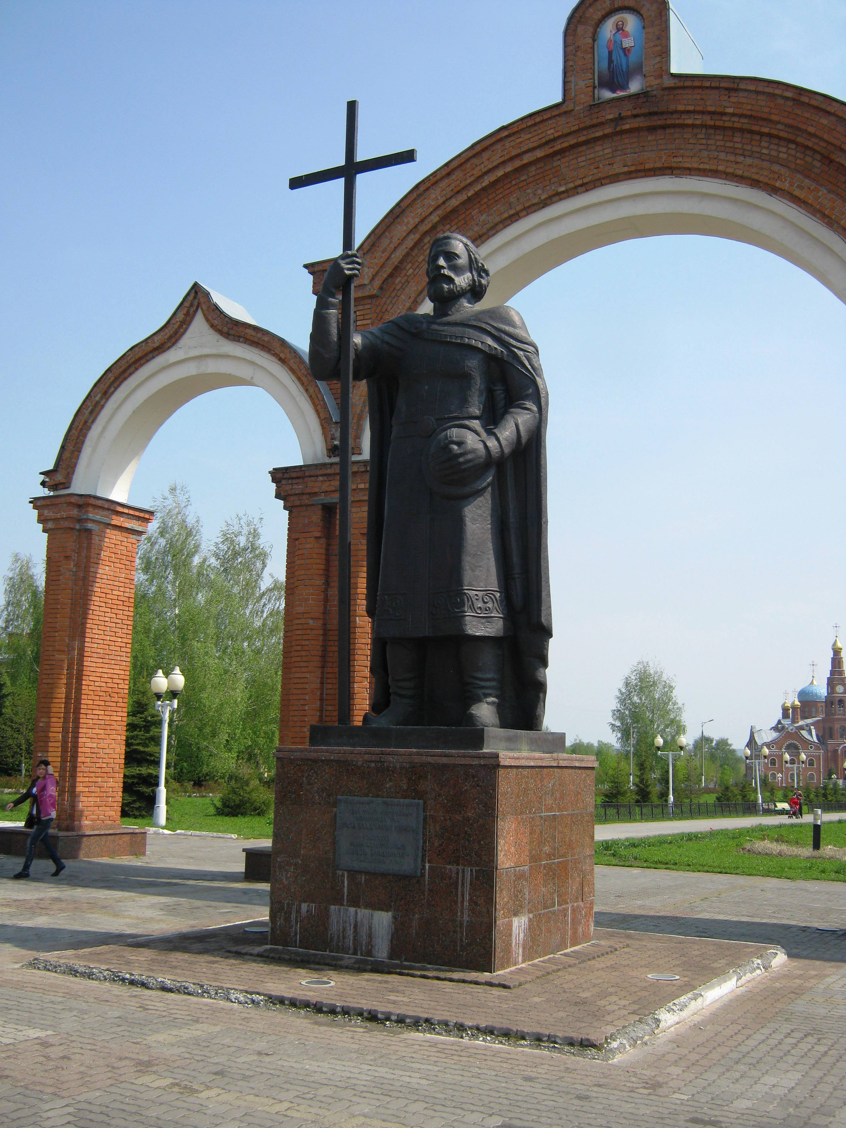 Памятник князю Владимиру в Новочебоксарске